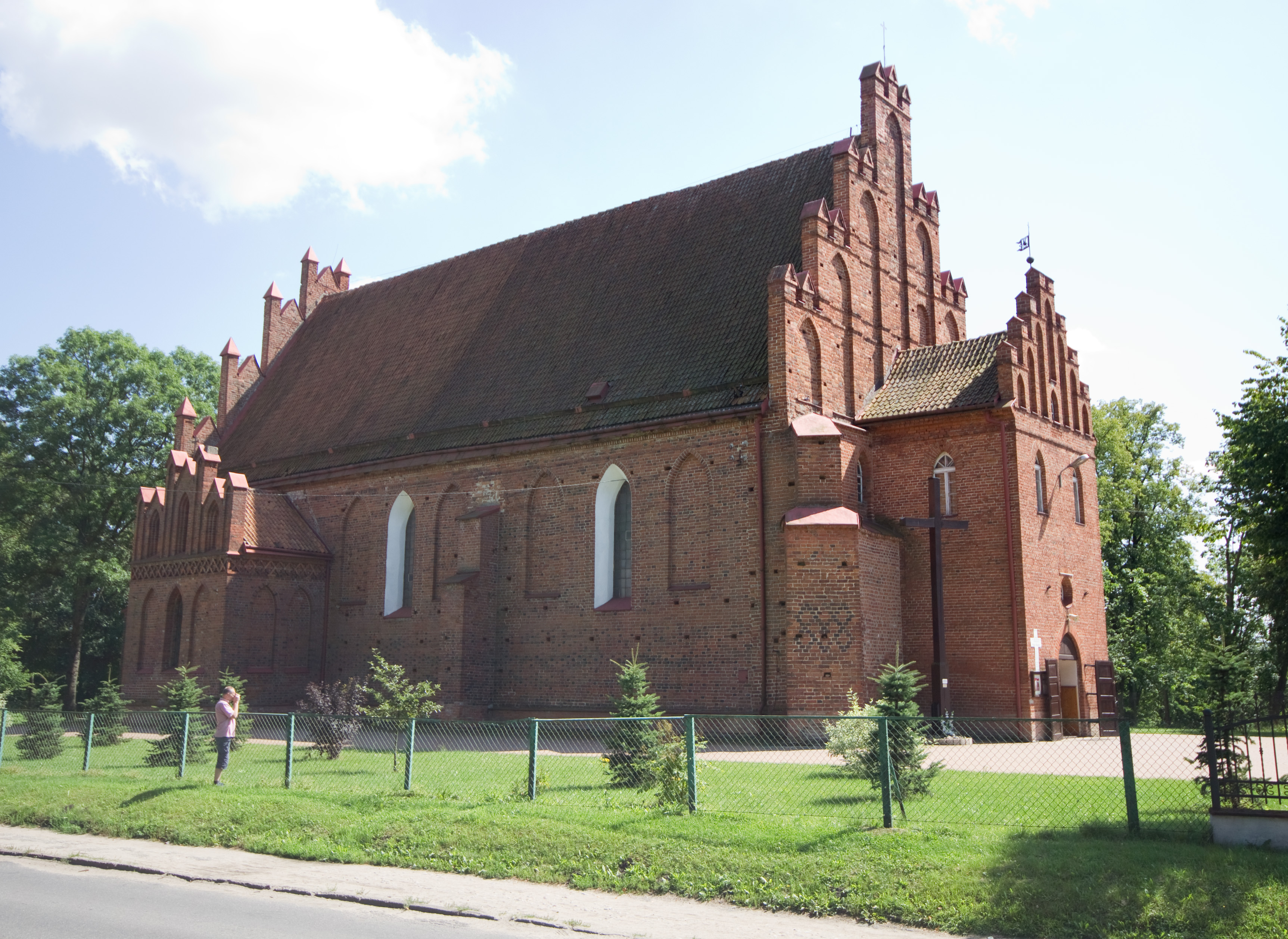 Kostel, Bartoszyce, gmina miejska, powiat bartoszycki, Varmijsko-mazurské vojvodství